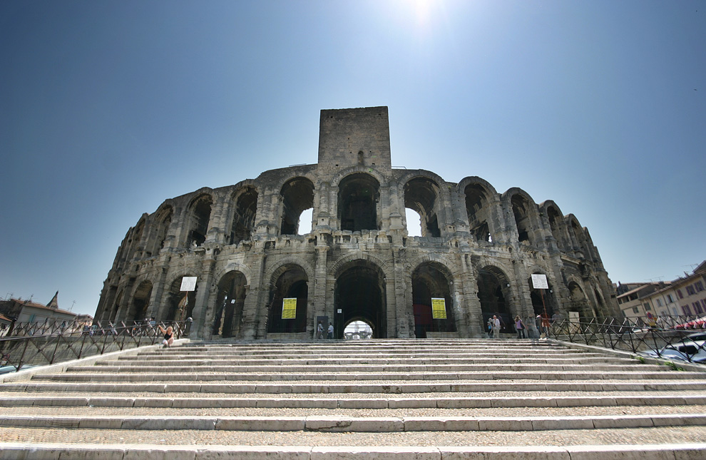 Amphitheater, Arles, Frankreich